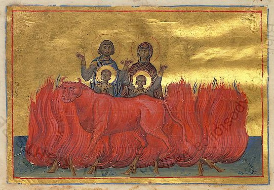 Мученичество св. Евстафия Плакиды с семьей. Миниатюра из Минология Васи-лия II. 976–1025 гг. (Vat. gr. 1613. P. 63) Eustathius (Eustace) Placidas, his wife Martyr Theopistes, and their children Martyrs Agapius and Theopistus, of Rome